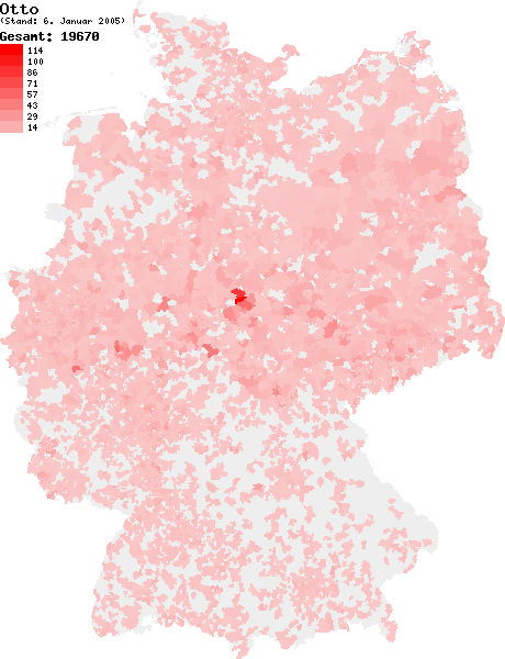 Verteilung des Nachnamens Otto in Deutschland nach dem Telefonbuch mit Stand vom 6. Januar 2005